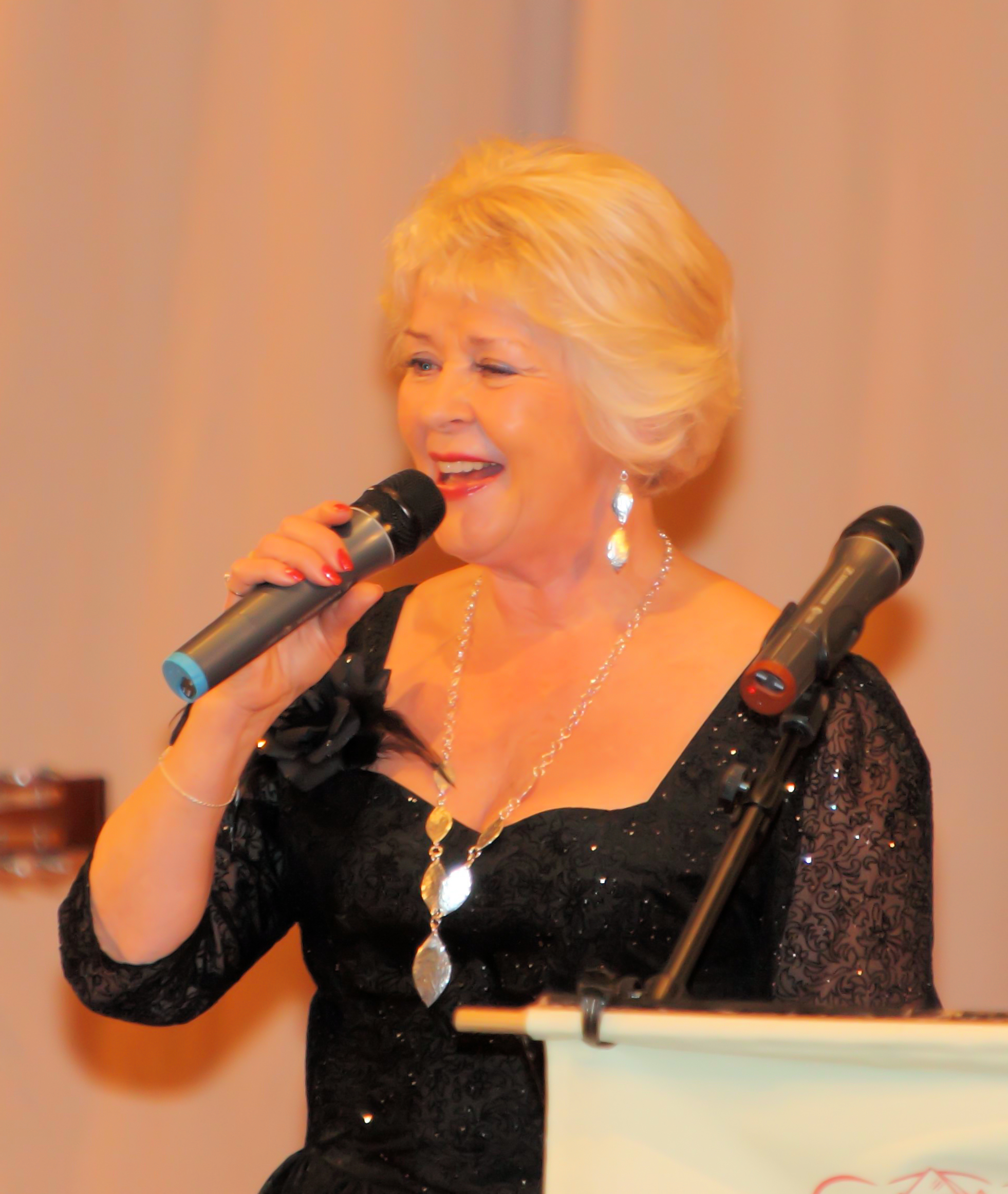 Rauni Pekkala suomalainen laulaja